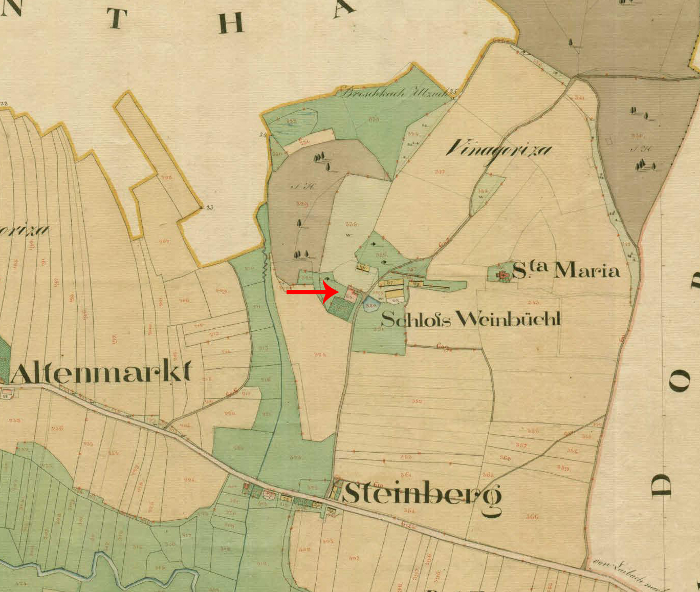 Franciscejski kataster za Kranjsko, 1823-1869